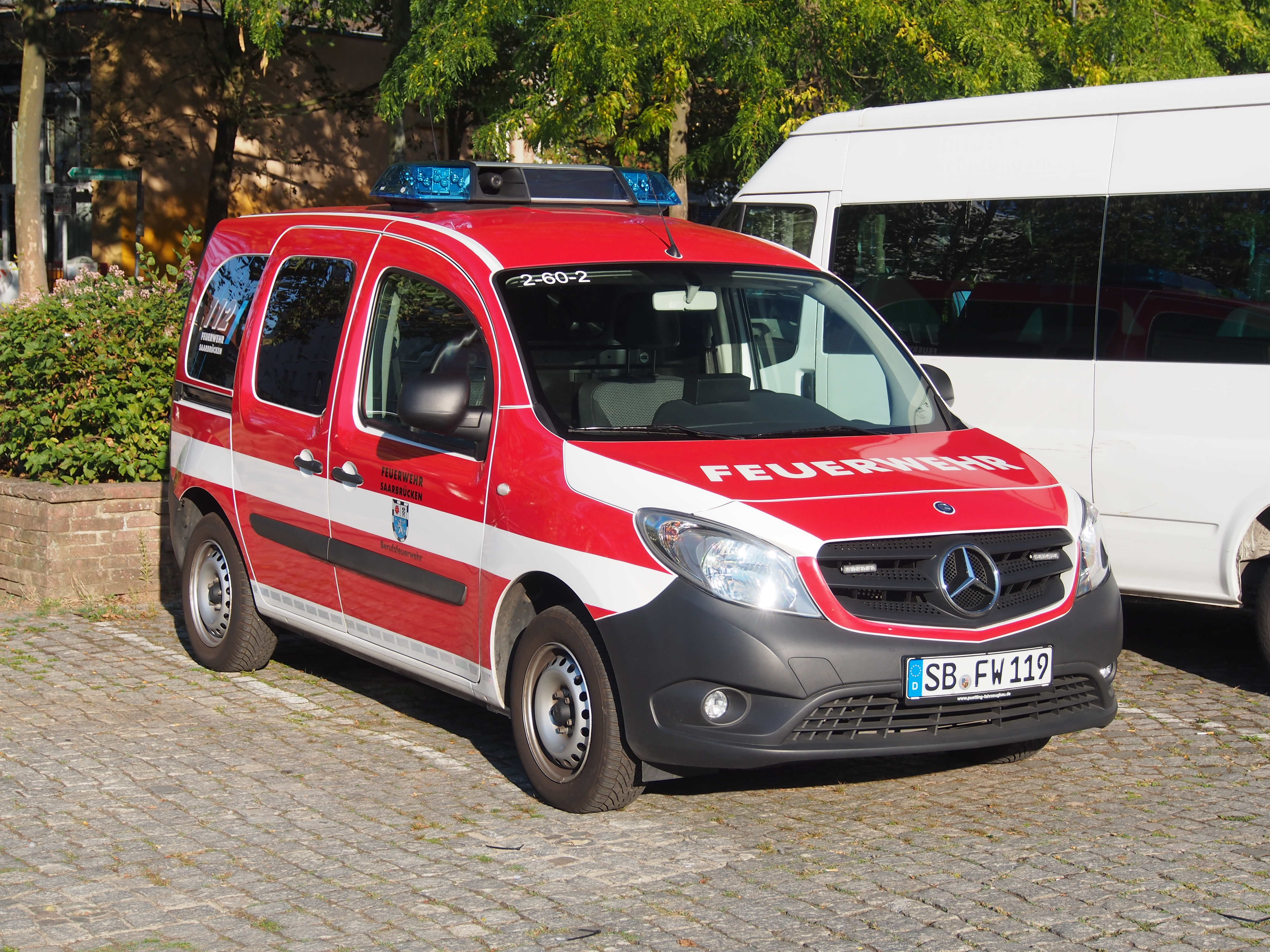 Photographed in Saarbrücken, Germany.